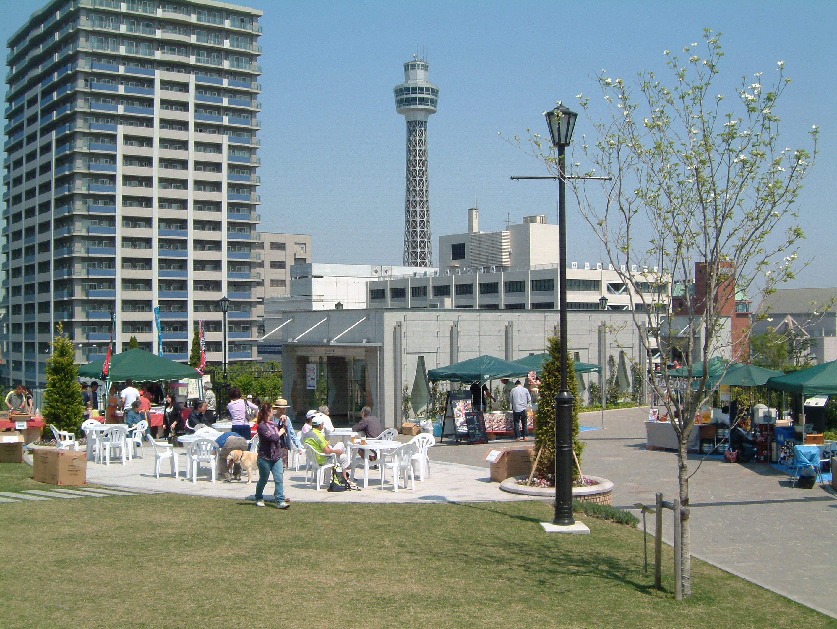 アメリカ山公園（横浜市中区）でイベント